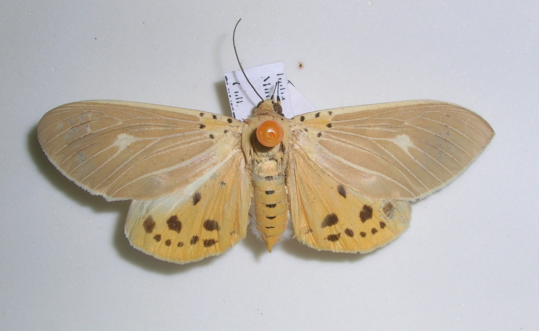 Asota producta from Mudigere, Karnataka